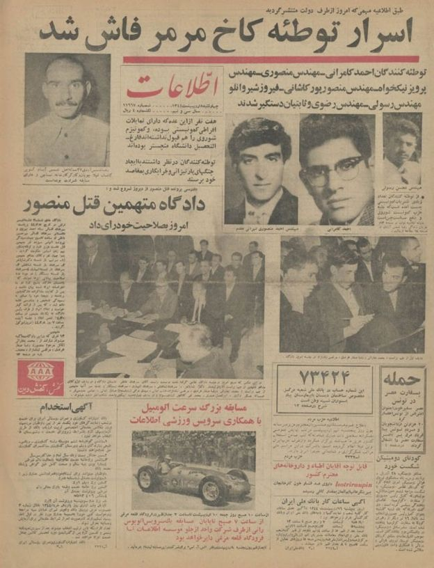 فهرست نام مدیران ترور محمدرضا شاه پهلوی در سال 1344 در روزنامه اطلاعات در 15 اردیبهشت 1344